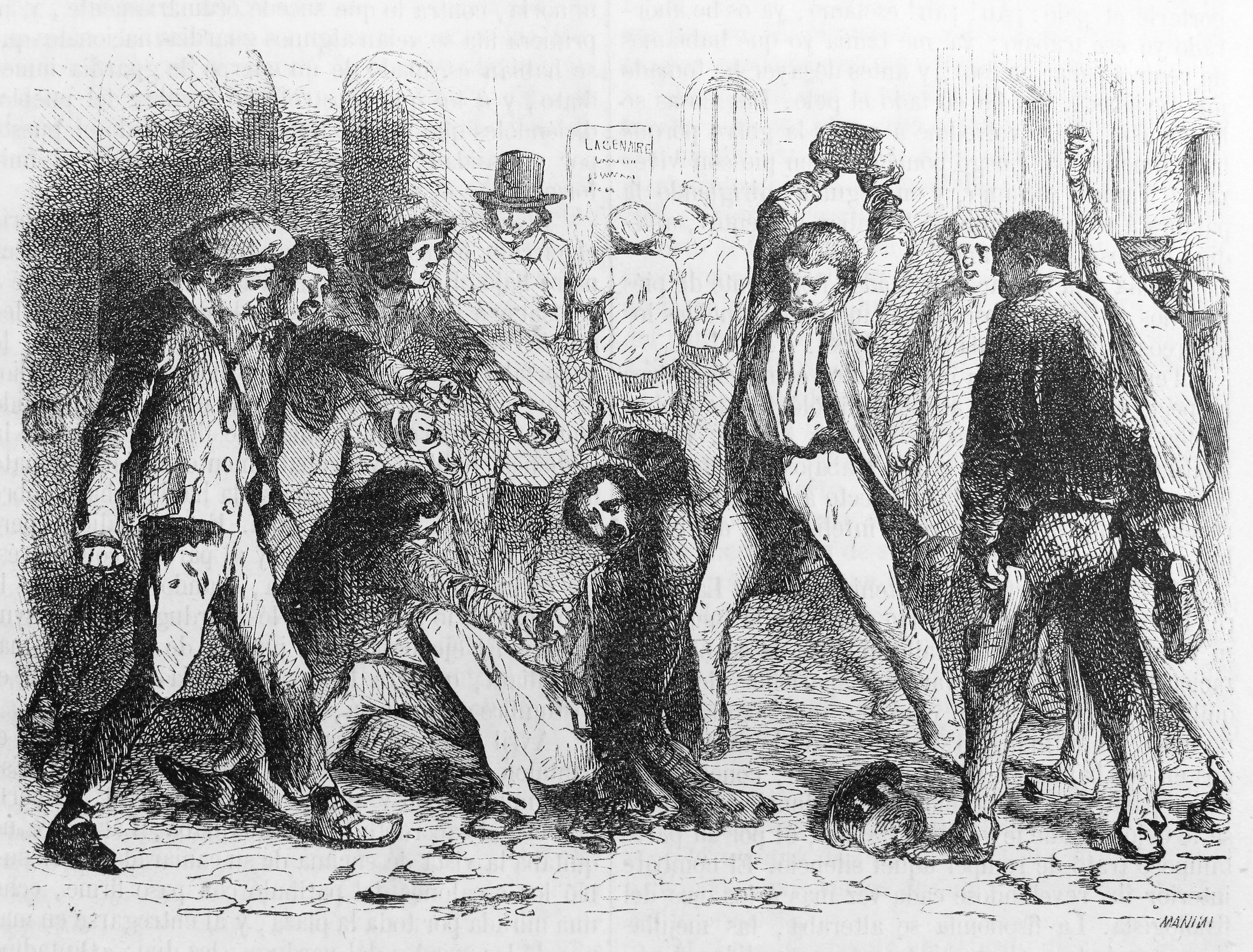 Robos y asesinatos por Lacenaire, Francois y Avril. "Lacenaire atacado por los presos de la cárcel." Ilustraciones de la obra : Anales dramáticos del crimen ó Causas célebres españolas y estranjeras [sic] / estractadas [sic] de los originales y traducidas, bajo la dirección de José de Vicente y Caravantes. - Madrid : Imprenta de Fernando Gaspar [etc.], 1858-1866. - Ed. il. con grabados...